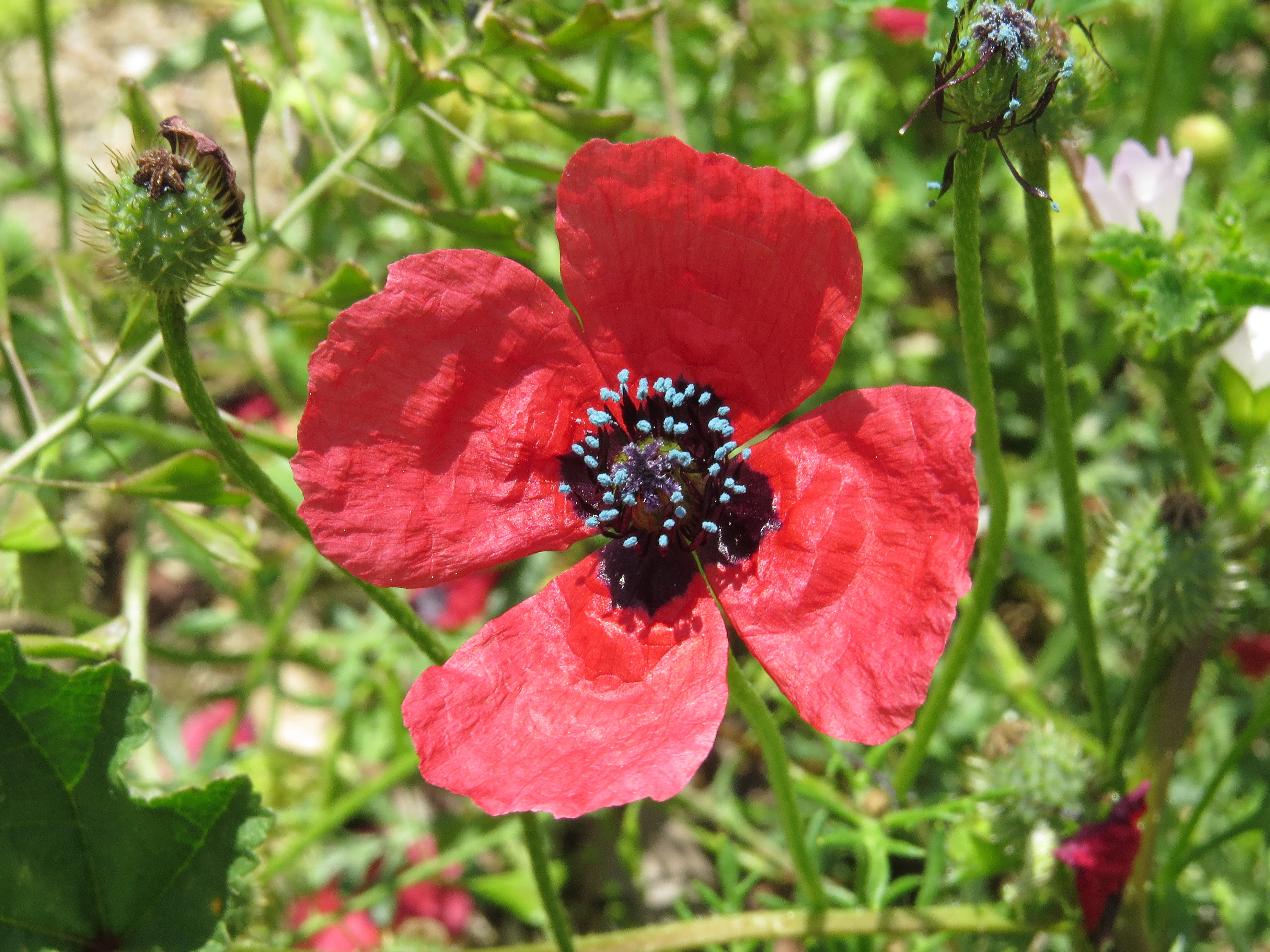 Flor de Papaver hybridum, Barrio de Moratalaz, Madrid, España.